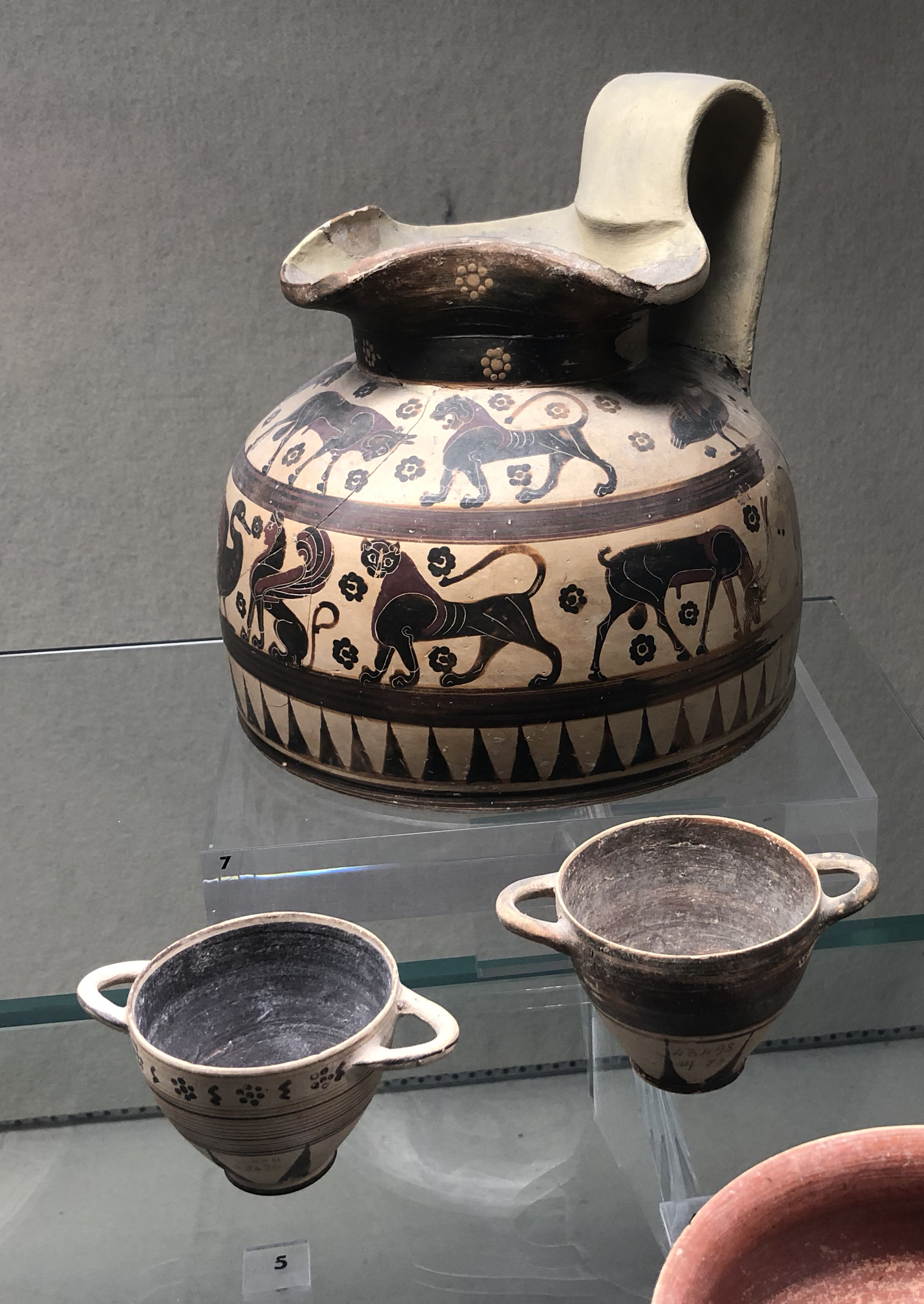 650-625 a.C.